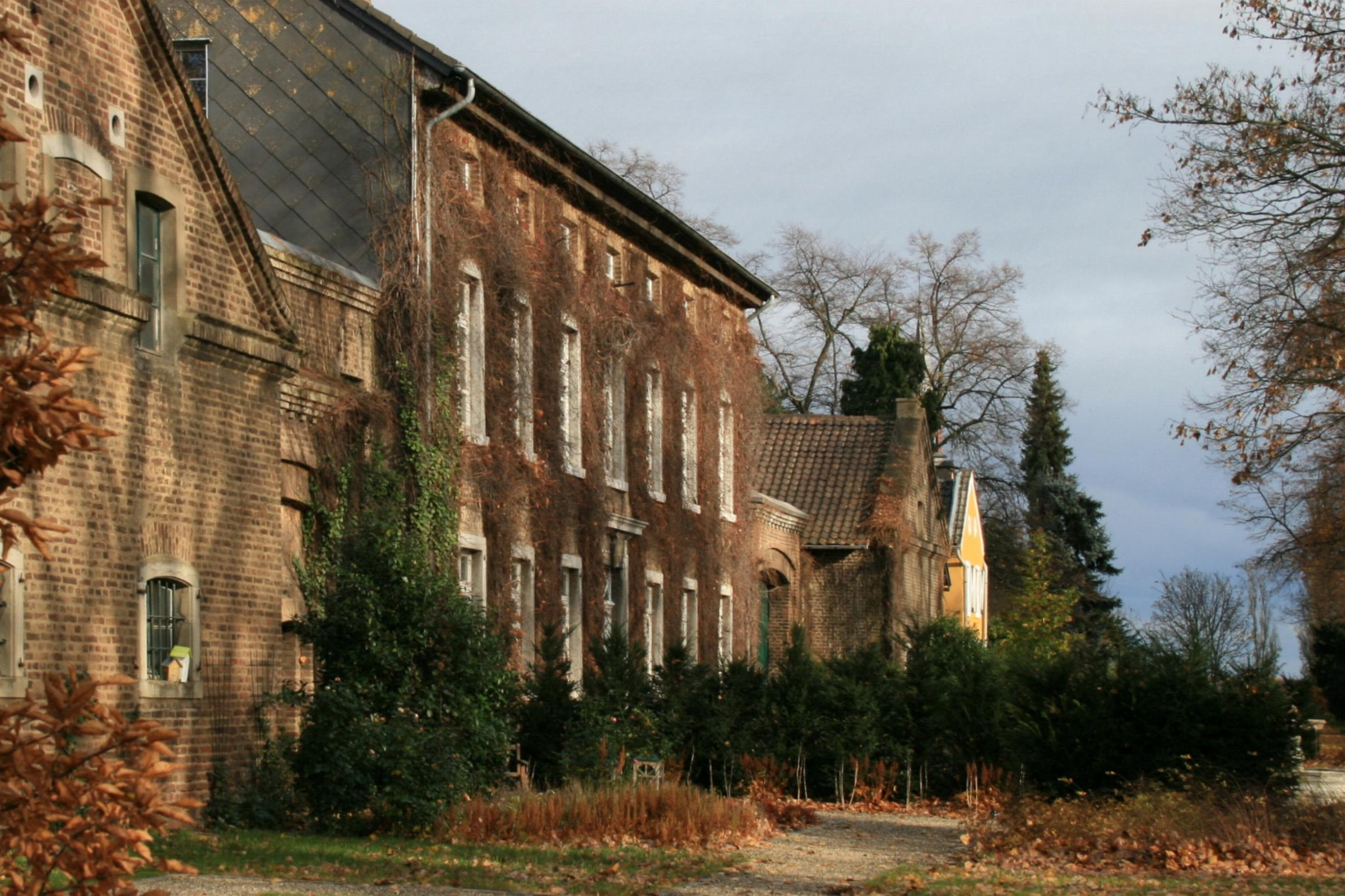 Gut Ollesheim zwischen Nörvenich und Eschweiler über Feld